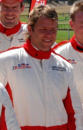 Glenn Archer